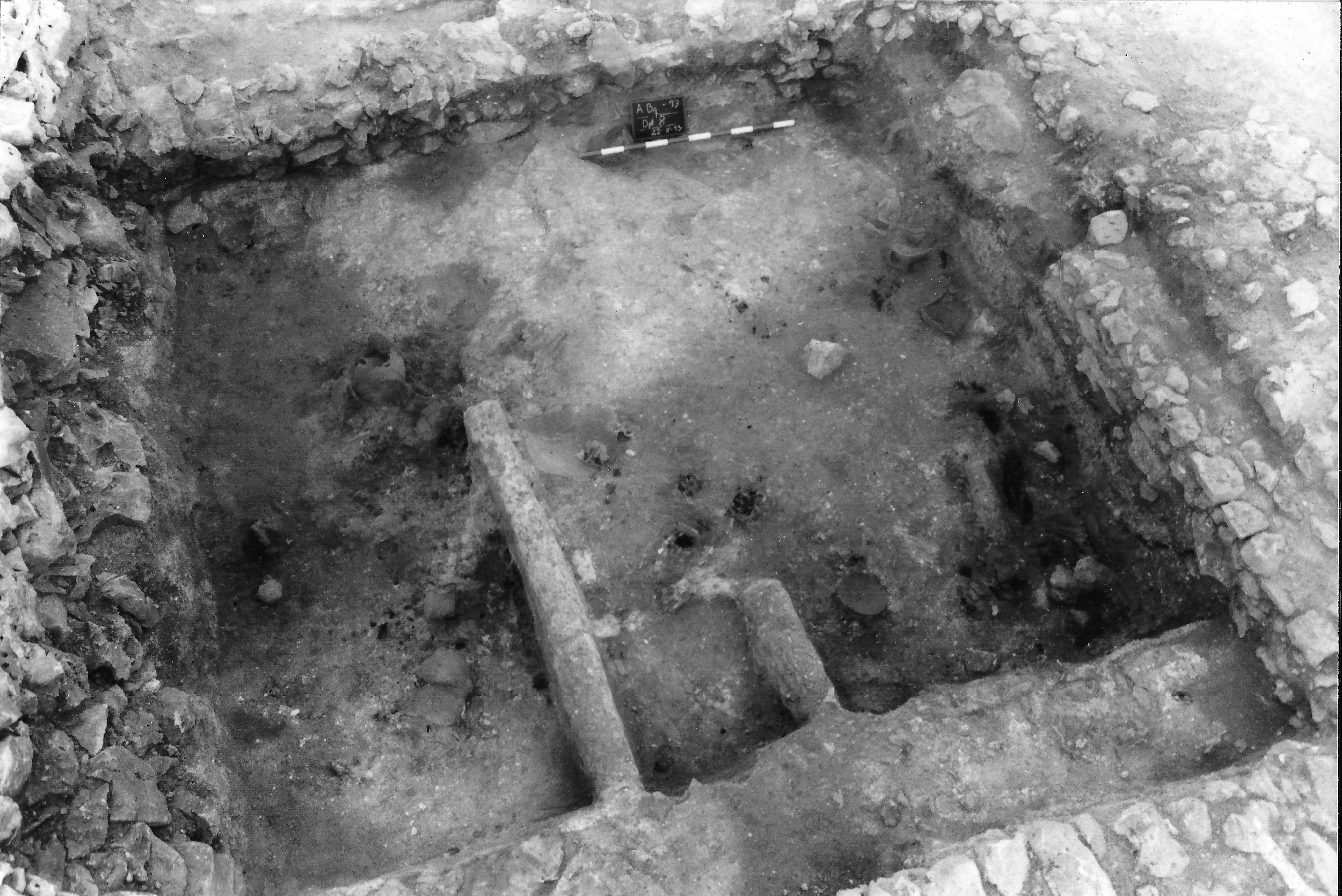 Alt de Benimaquia, departamento 8. Superposición de ocupaciones. En el nivel primitivo se aprecian estructuras de una vivienda compartimentada con un tabique medianero. El hora en la esquina inferior derecha, la entrada en la superior derecha.